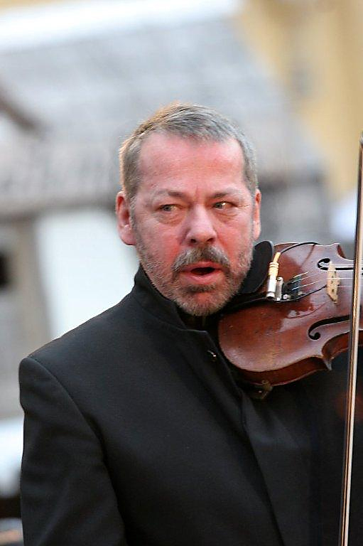 Hannes Beckmann beim Konzert von Canto Migrando am Odeonsplatz, München